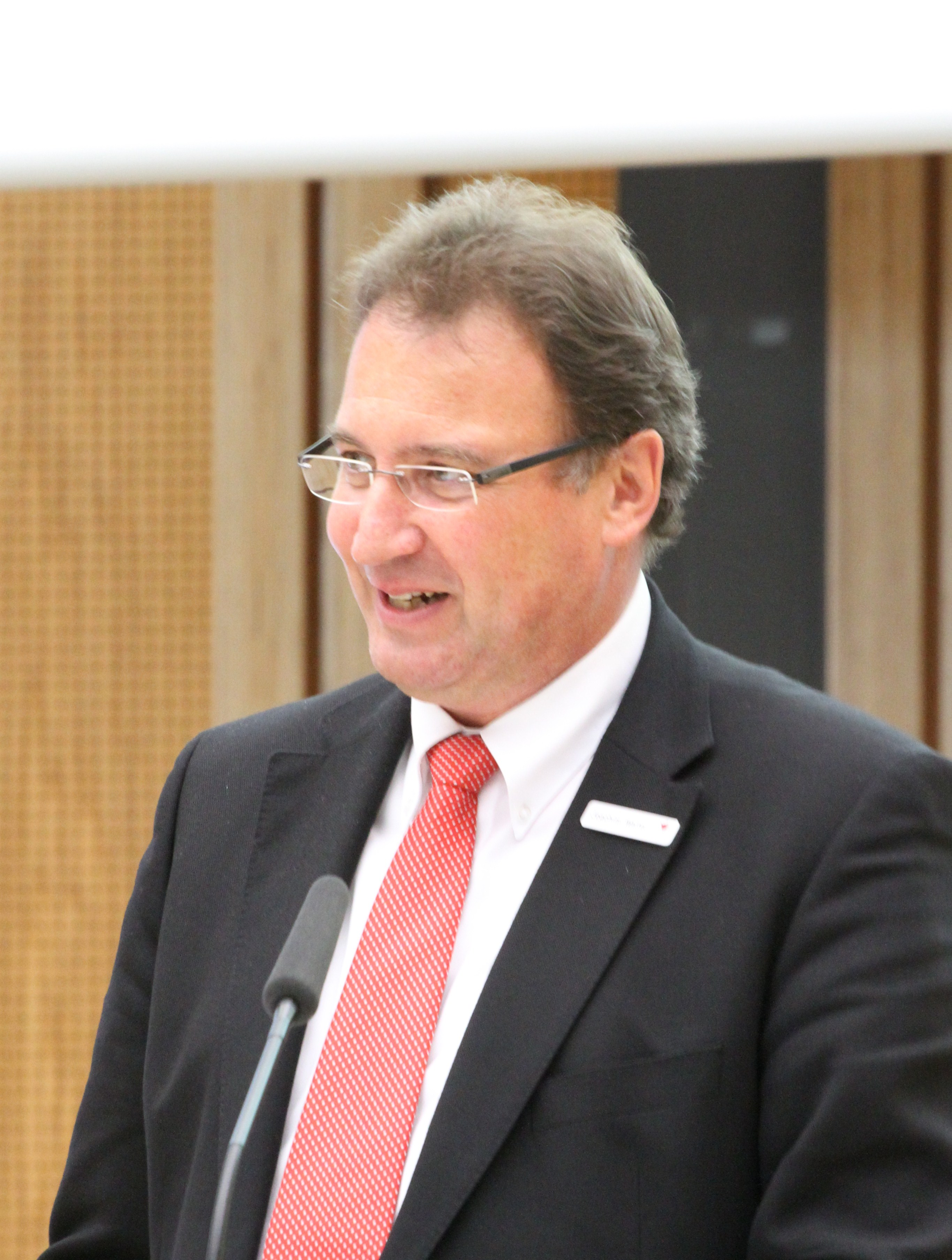 Joachim Walter Landrat Kreis Tübingen